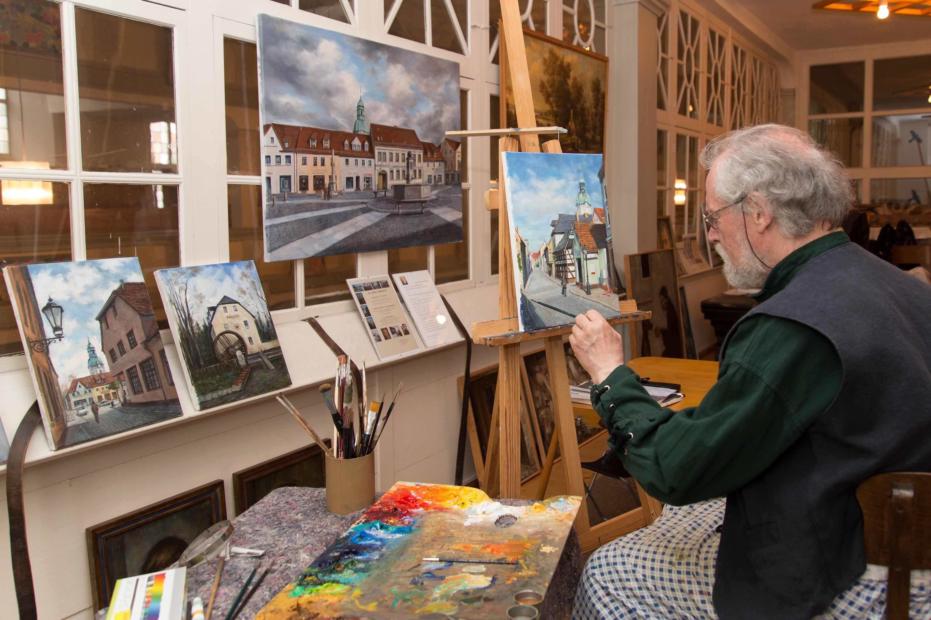 Ausstellung und Atelier des georgischen Malers Anatoly Rjaboschenko in der evangelischen Kirche Ruhland zum Stadtjubiläum 2017